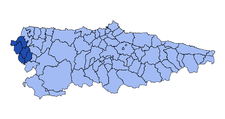 Concejos que forman la mancomunidad asturiana de los Concejos de Oscos-Eo